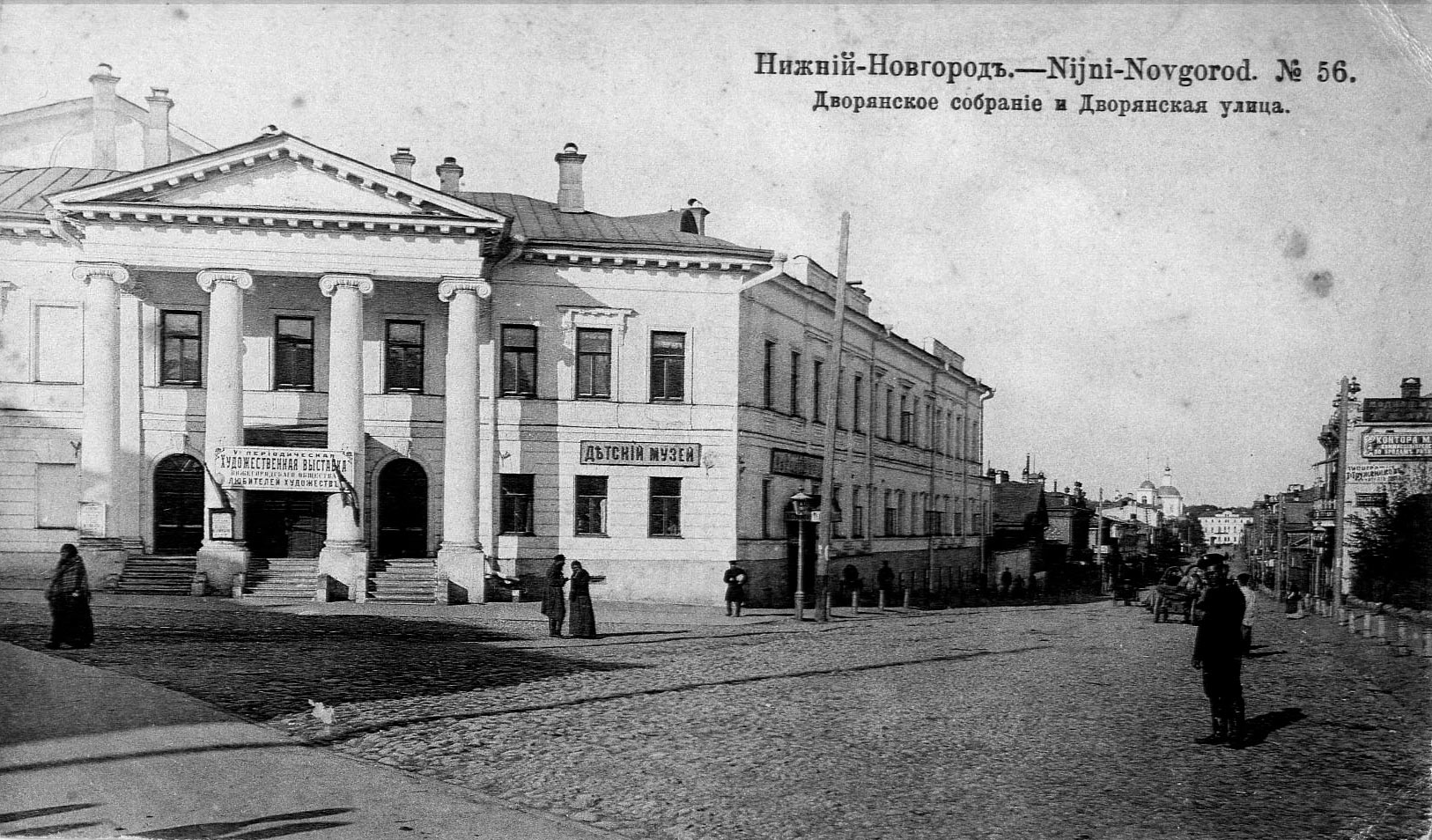 Дворянское собрание (сейчас ДК им. Я. М. Свердлова) на Большой Покровской, Нижний Новгород